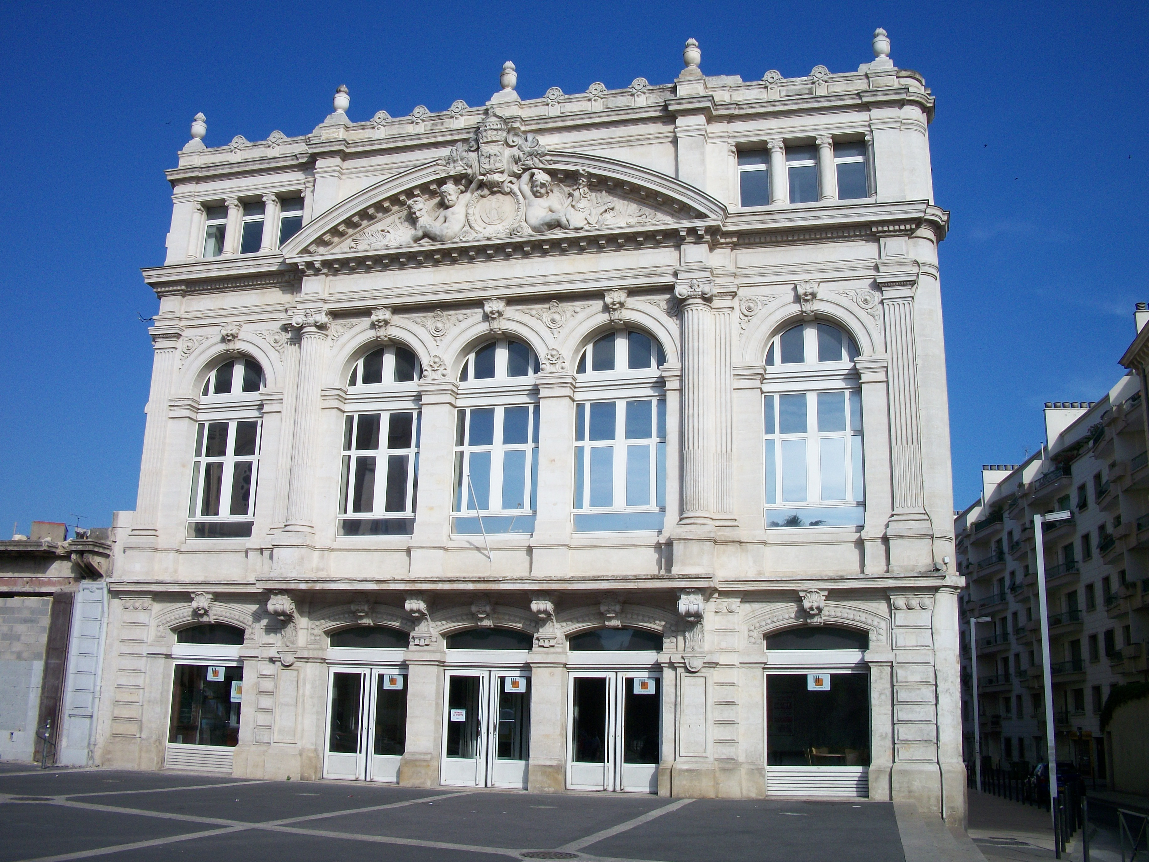 Site des Carmes de la faculté des Sciences de Nîmes